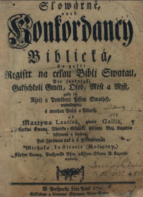 Titulný list diela Slowárně aneb Konkordancy Biblická, to gest: Registr na celau Bibli Swatau, pro snadněgssj Gakýchkoli Gmén ..., ktorú vytlačil Šimon Peter Weber v Bratislave v roku 1791.